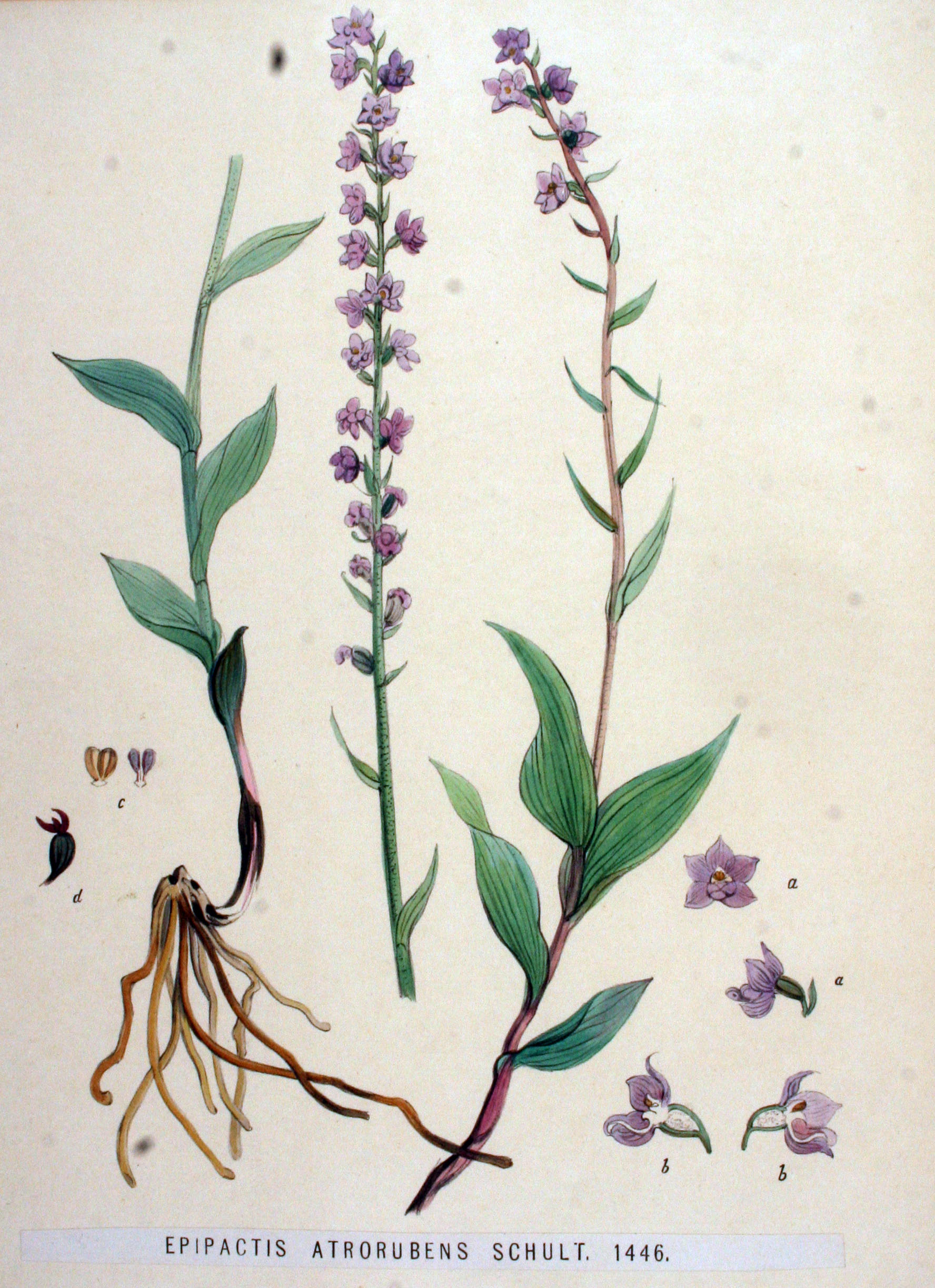 Epipactis atrorubens (Hoffmann) Besser